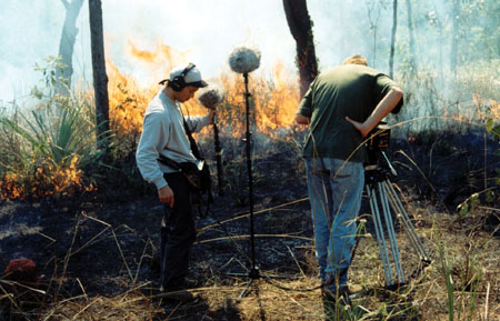 Nikolaus Geyrhalter dreht in Australien für ELSEWHERE (Film), 2001